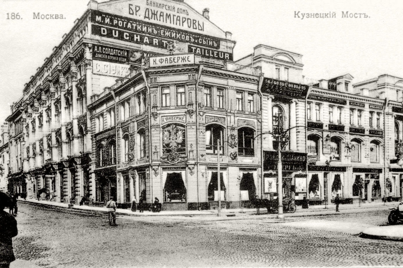 Доходный дом Московского купеческого общества (Кузнецкий Мост, № 10/8)